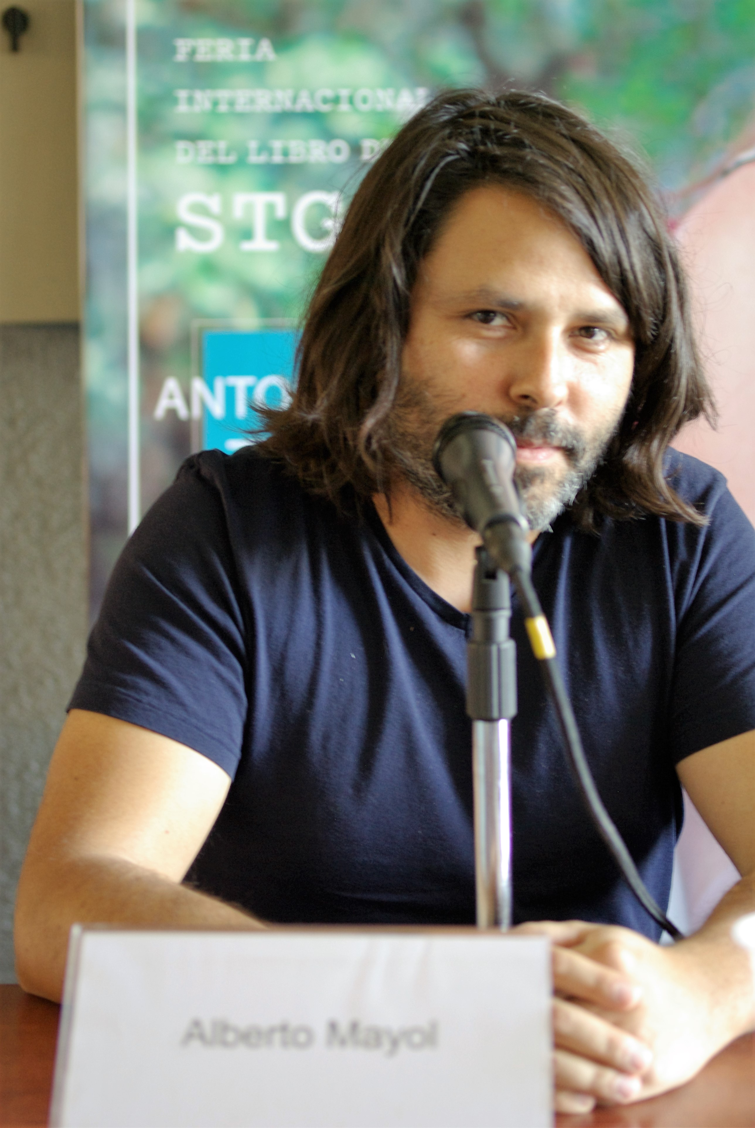 El sociólogo chileno Alberto Mayol durante la presentación de su libro Autopsia, de qué se murió la elite chilena (editorial Catalonia), organizada por Clepsidra Libros durante la Feria Internacional del Libro de Santiago, Sala Pedro Prado del Centro Cultural Estación Mapocho, 29.10. 2016